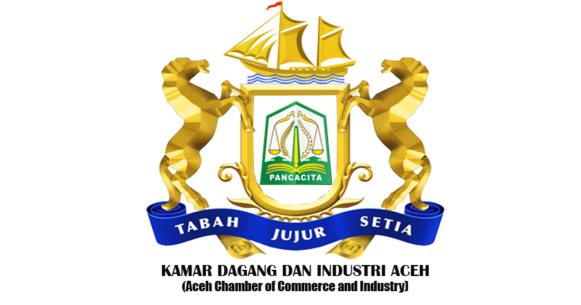 Lambang ini digunakan oleh Kamar Dagang dan Industri Aceh untuk segala keperluan yang ada dalam organisasi Kadin Aceh.